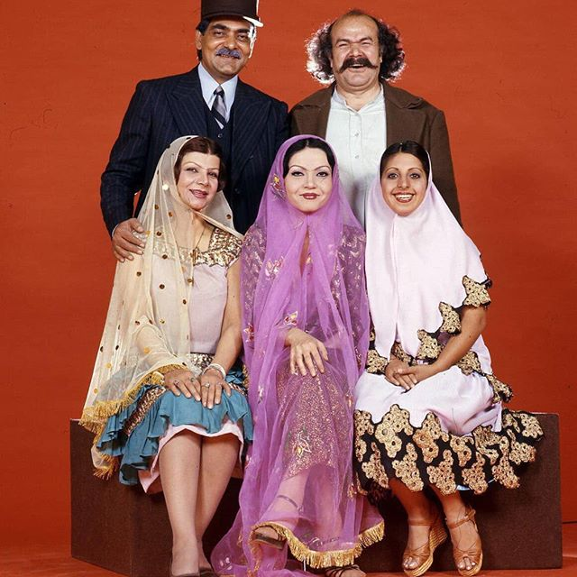 سریال مرد اول